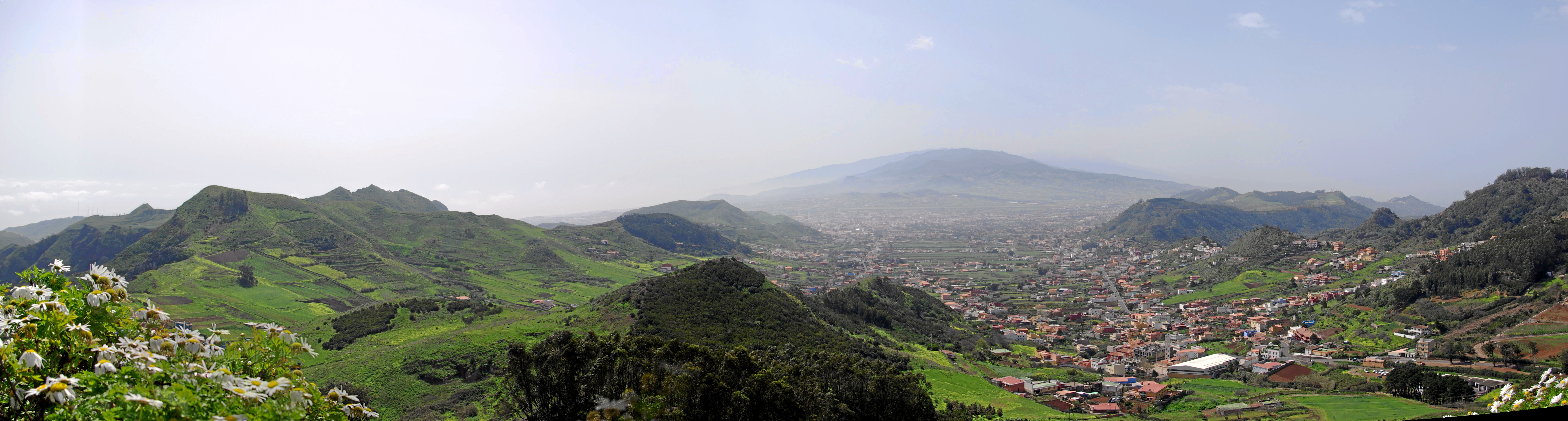 Teneriffa, La Laguna, Panorama